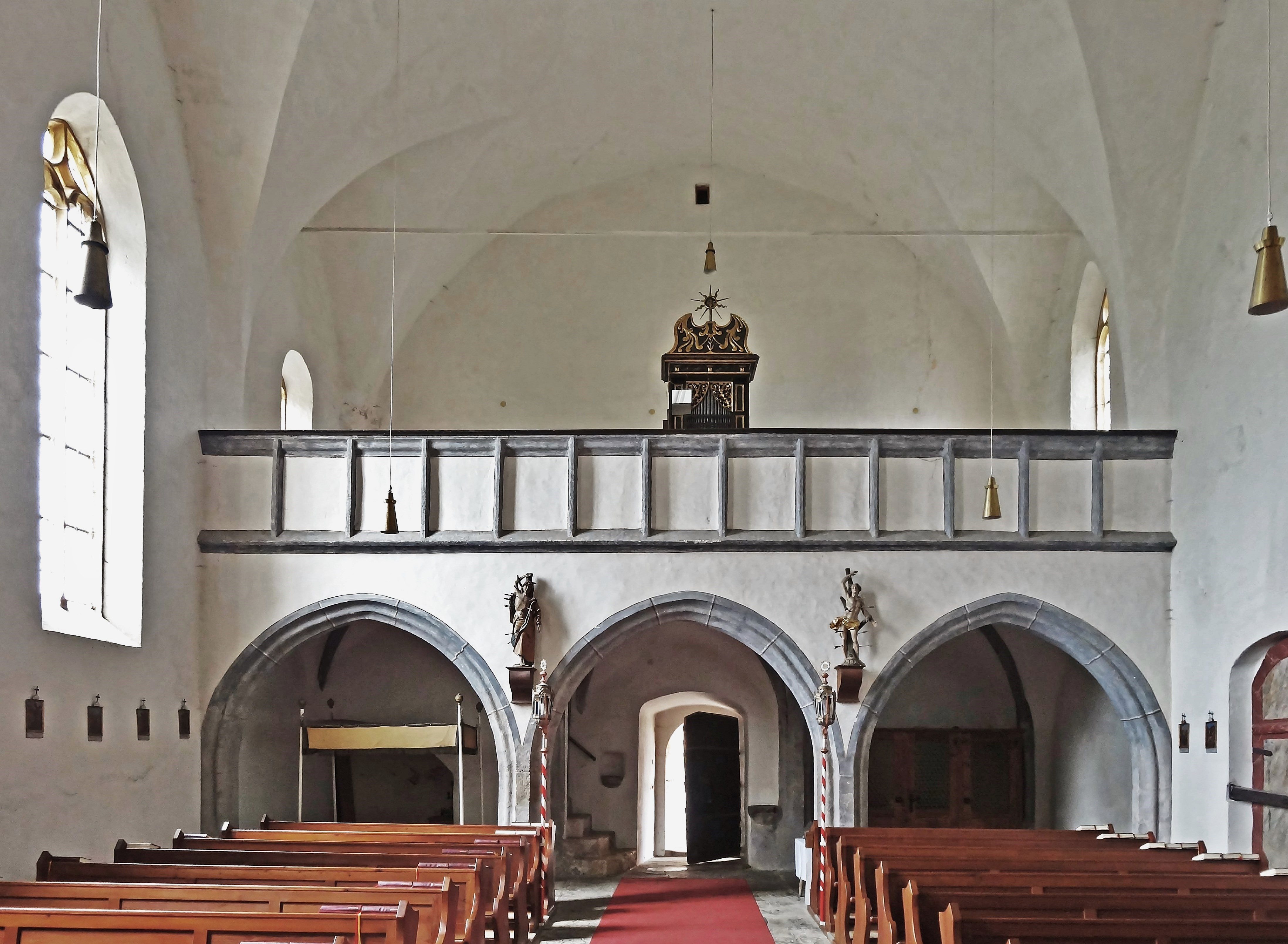 Kath. Filialkirche St. Sebastian (Launsdorf), die Empore